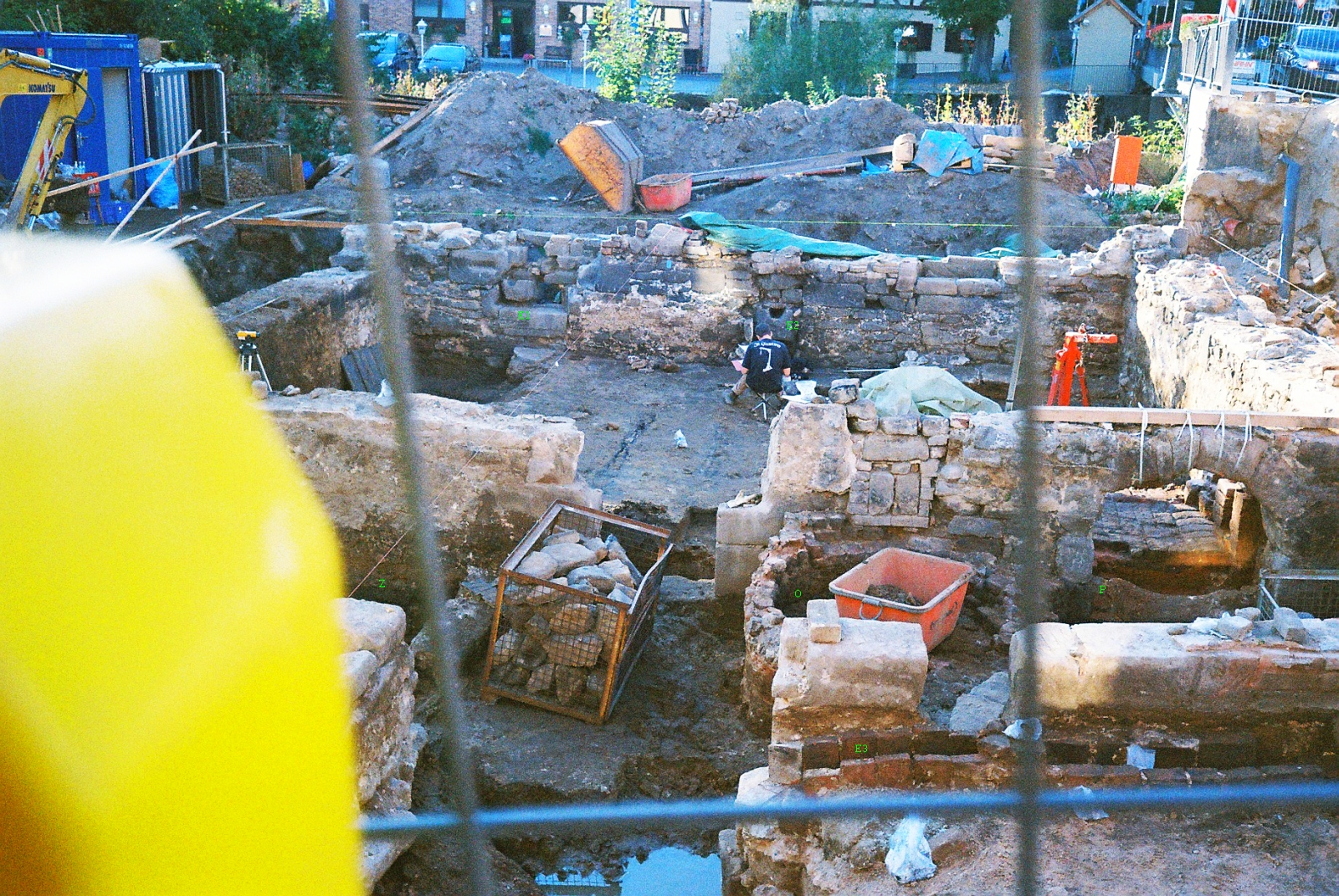 Grabung, Badhaus Wendelstein September 2012, Blick von Süden Mitte: das Erdgeschoss aus den 1430er Jahren mit Giebelausrichtung Nord - Süd Vorne: der Anbau von 1730 mit Giebelausrichtung West - Ost E1 = Hauptentwässerungsrinne E2 = Entwässerungsrinne E3 = Entwässerungsrinne Anbau P = Portal, urspünglich der Haupteingang, später die Feuerungsöffnung (im Bild vorbereitet zur Blockbergung) O = spätere, weitere Ofengründung (etwa 1740) Z = Zisterne, Treppe zu Brunnenstube